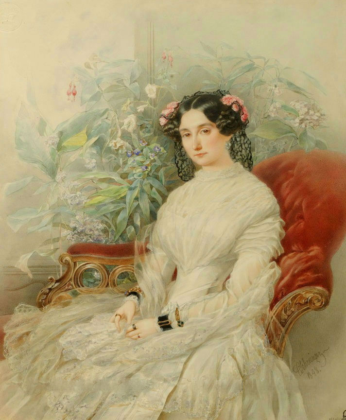 Графиня Екатерина Федоровна Тизенгаузен (1803–1888)